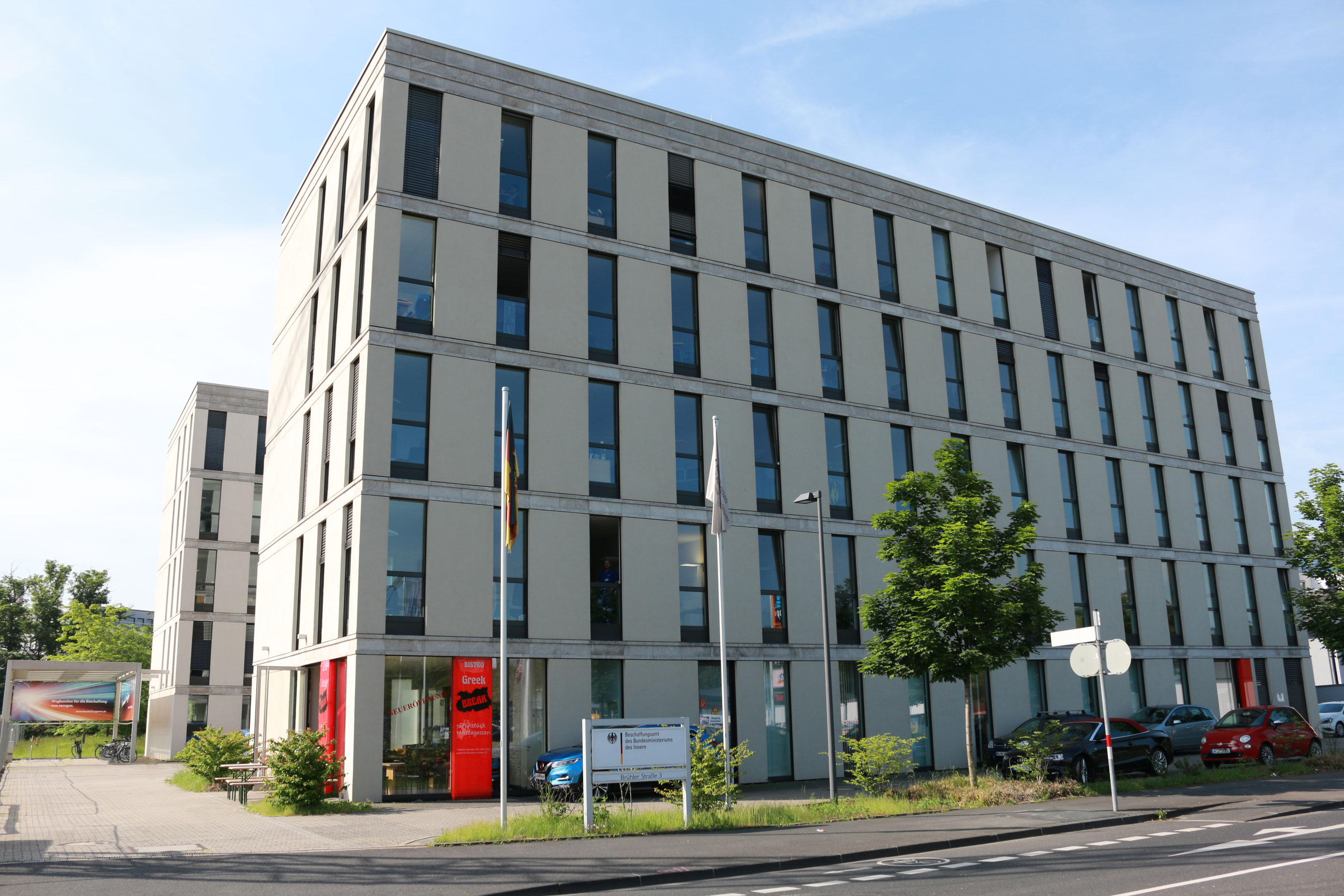 Gebäude Beschaffungsamt des Bundesministerium des Innern auf der Brühler Straße in Bonn.